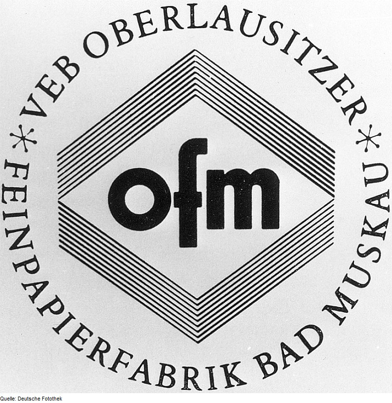 Original image description from the Deutsche Fotothek Bad Muskau-Köbeln. Papierfabrik, Firmenzeichen OFM